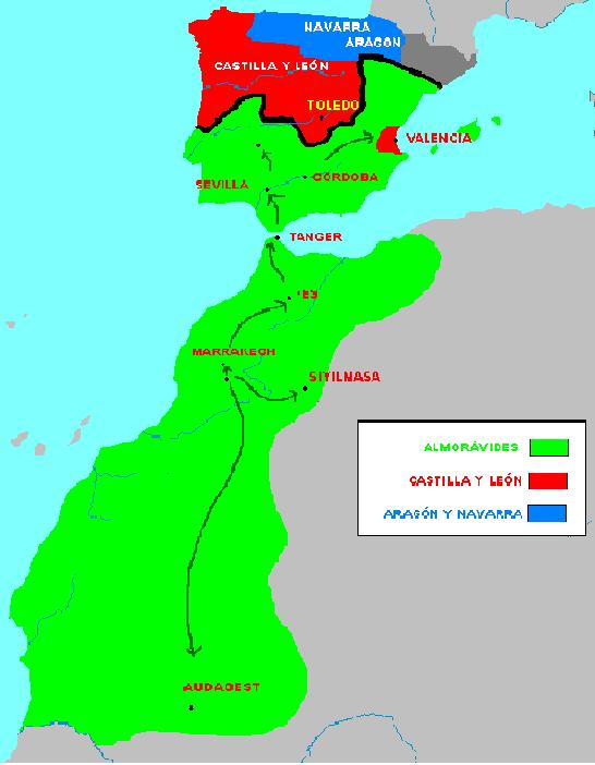 Imperio Almorávide